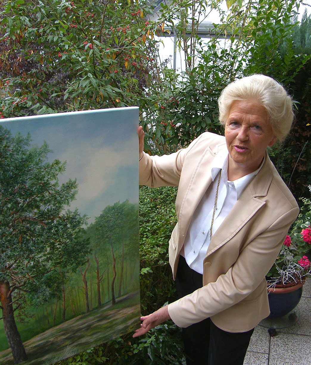 Eleonora Heine-Jundi, Deutschlands renommierteste Baummalerin, 2006 im Garten ihres Domizils in Brohl-Lützing (Kr. Ahrweiler).